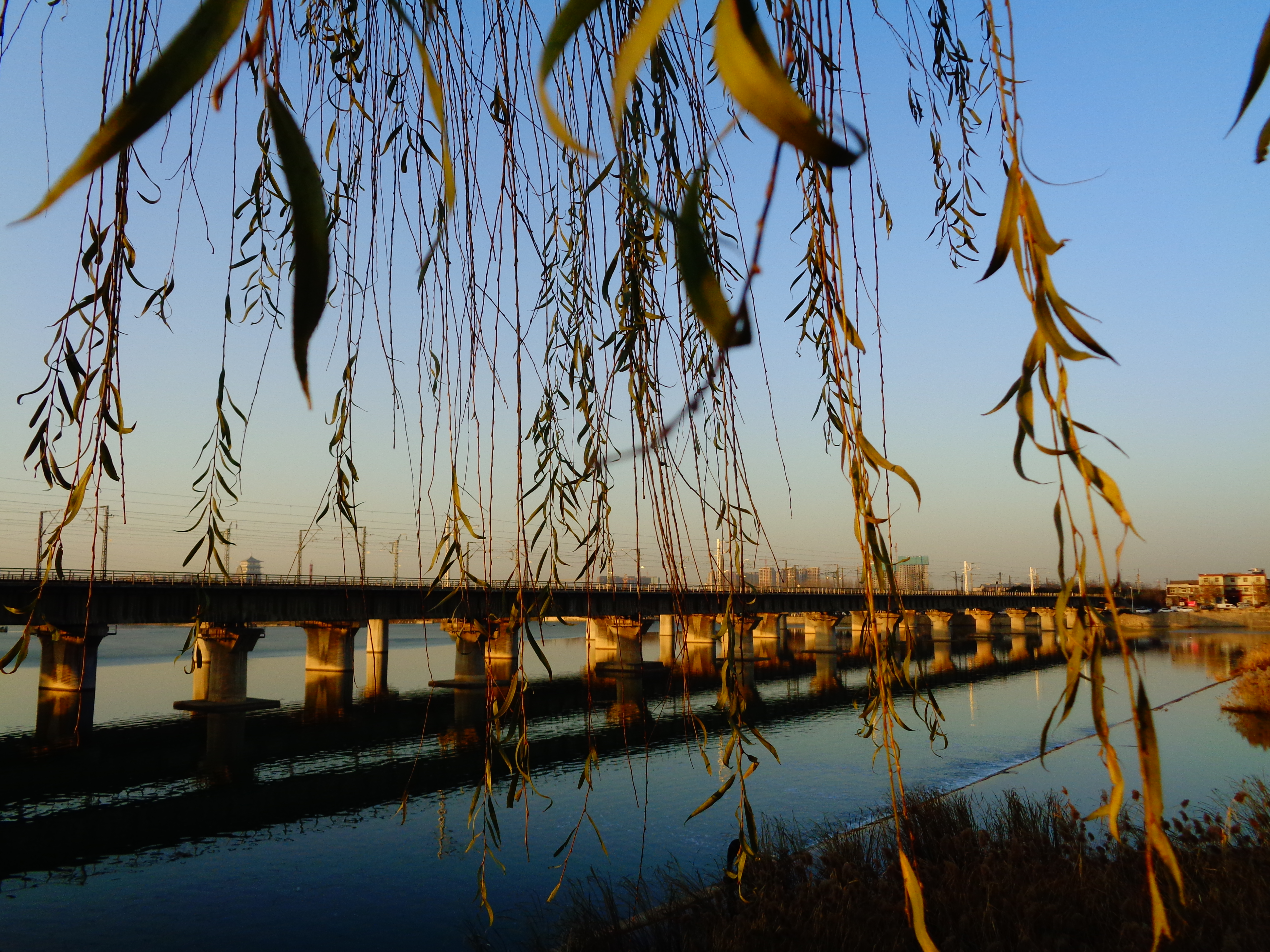 西安市灞桥区陇海铁路灞河桥，拍车又拍景，一箭双雕